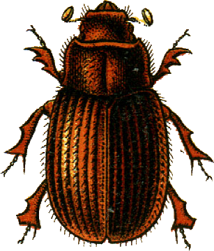 This file has been extracted from another file: Jacobs26.jpg